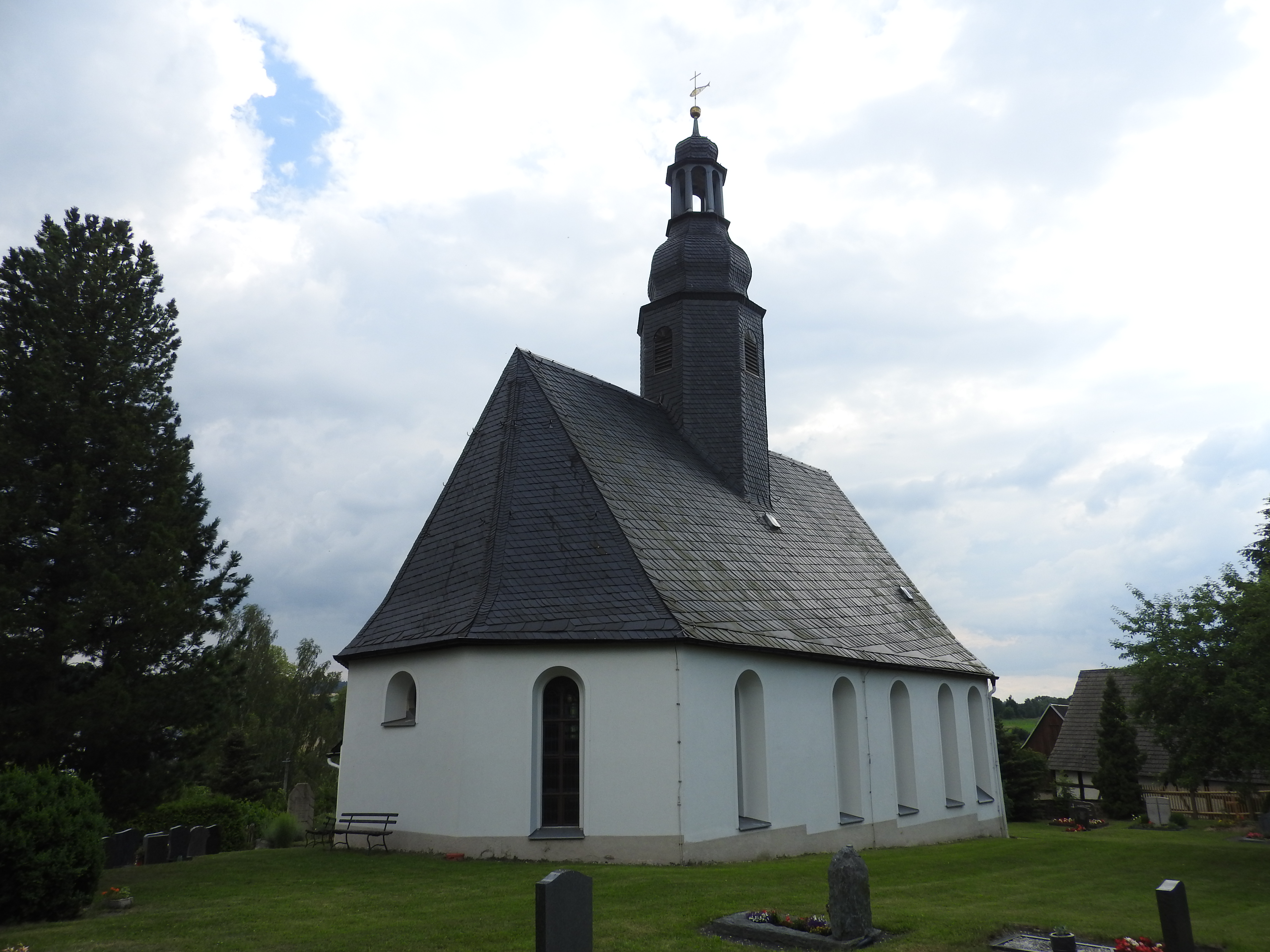 Kirche in Gottesgrün, Thüringen